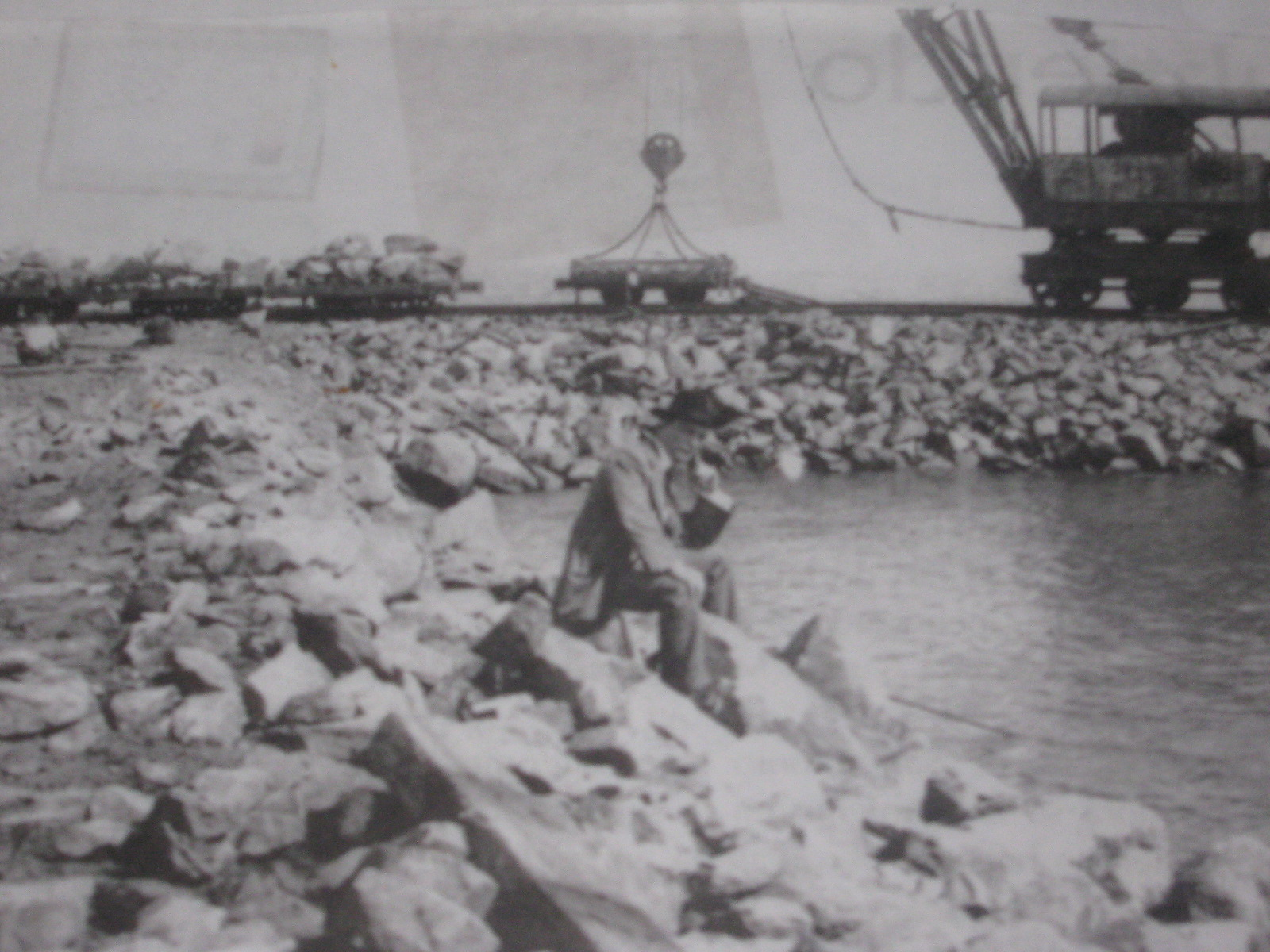 Contrucción del puerto de san antonio, chile